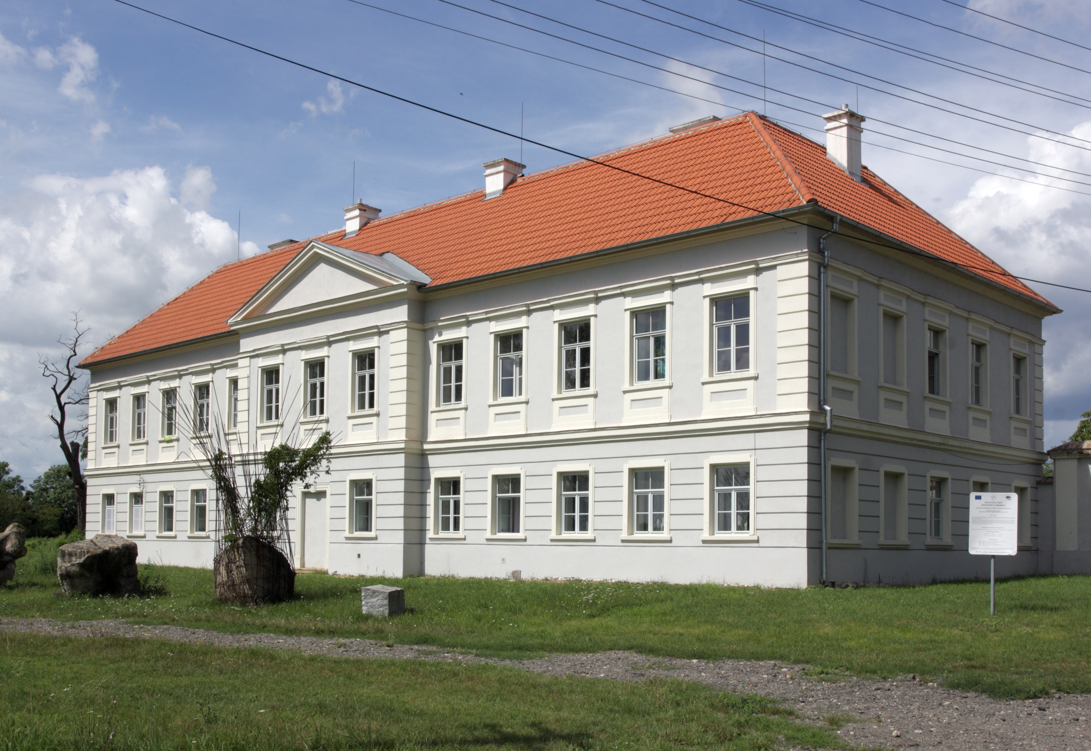 Pohořelice, Velký Dvůr - zámeček Leopoldsruhe.